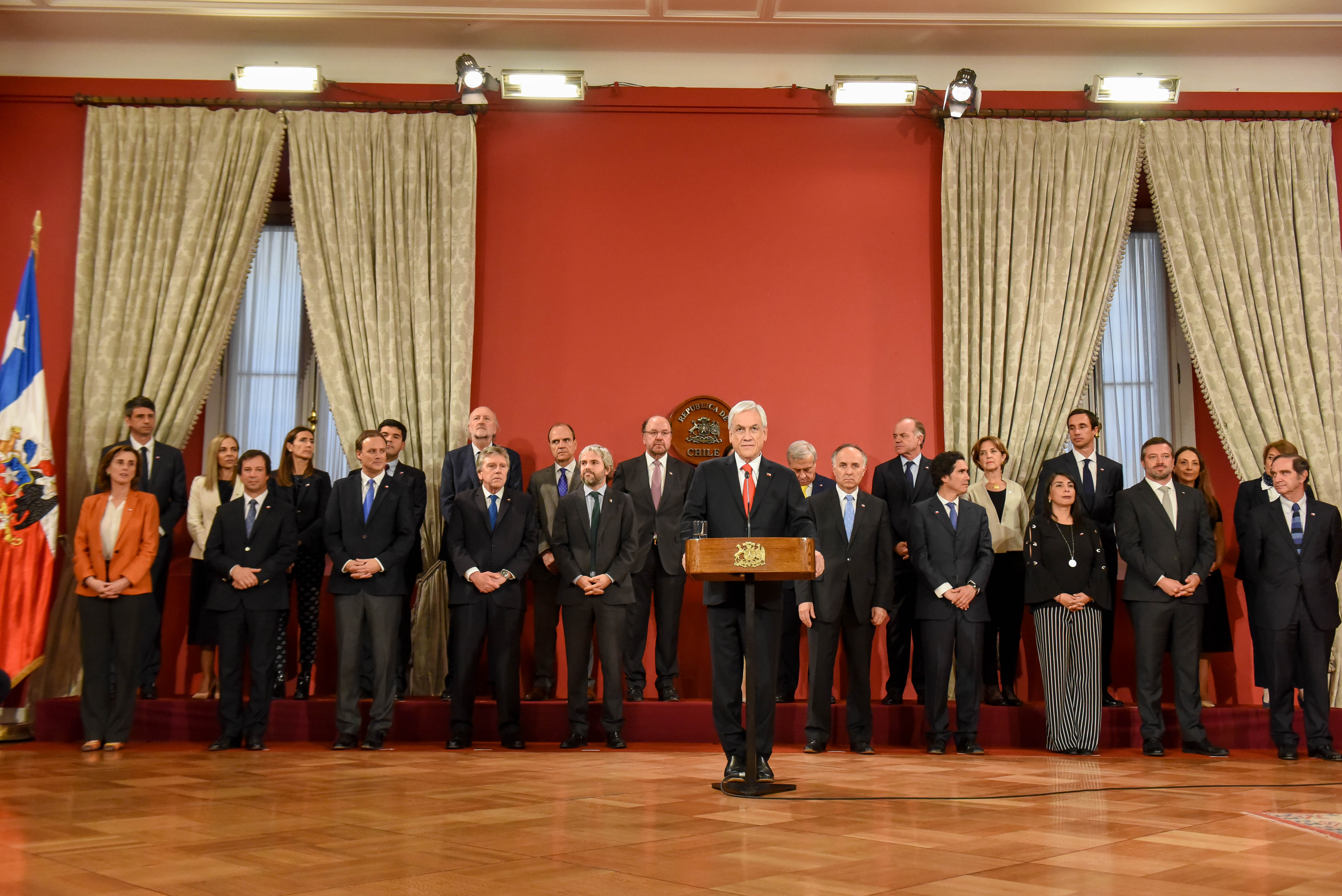 Cambio de Gabinete del presidente Sebastián Piñera en octubre de 2019